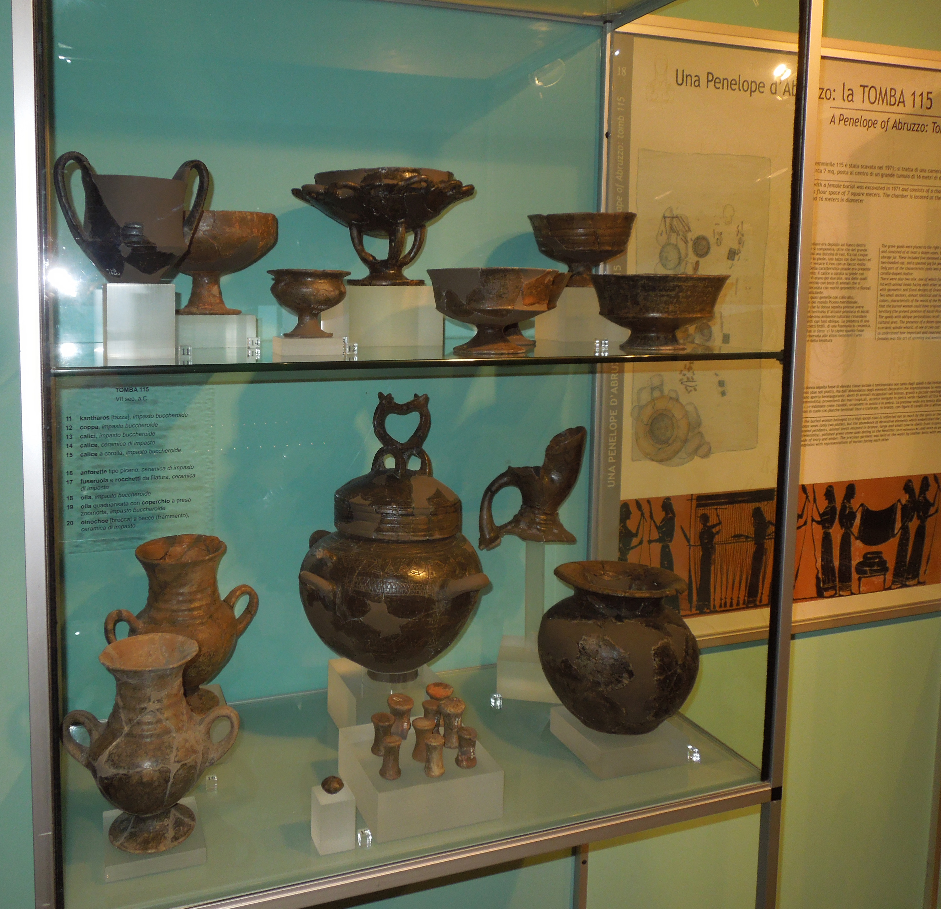 Teca contenente reperti provenienti dalla tomba n. 115 della Necropoli di Campovalano in provincia di Teramo.